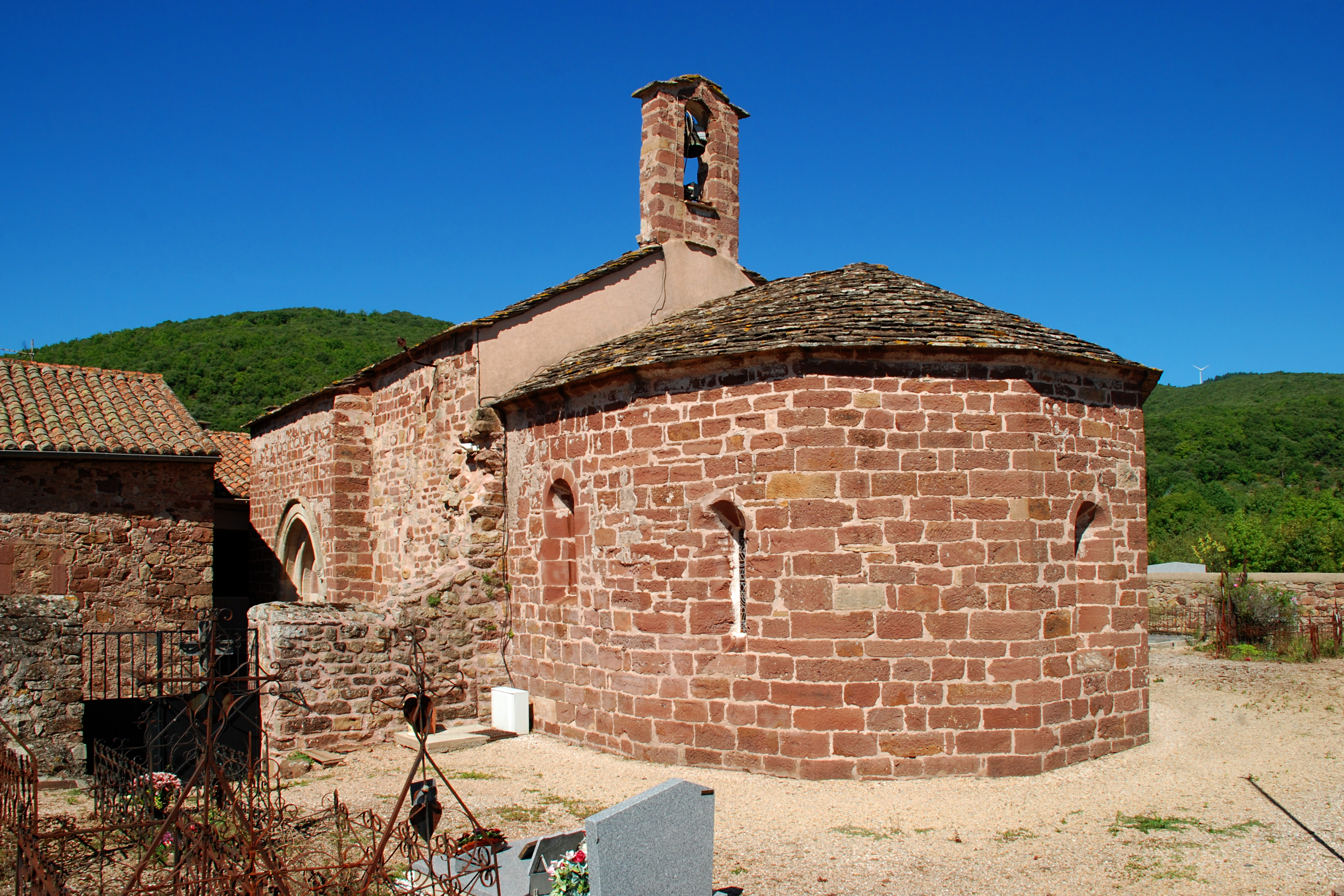 France - Languedoc - Hérault - La Tour-sur-Orb - Église Sainte-Marie de Frangouille